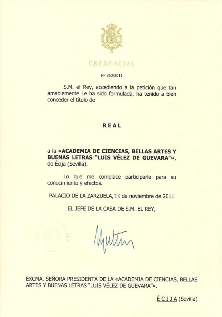 Título de Real otorgado por S.M. el Rey a la Academia de Ciencias, Bellas Artes y Buenas Letras "Luis Vélez de Guevara"